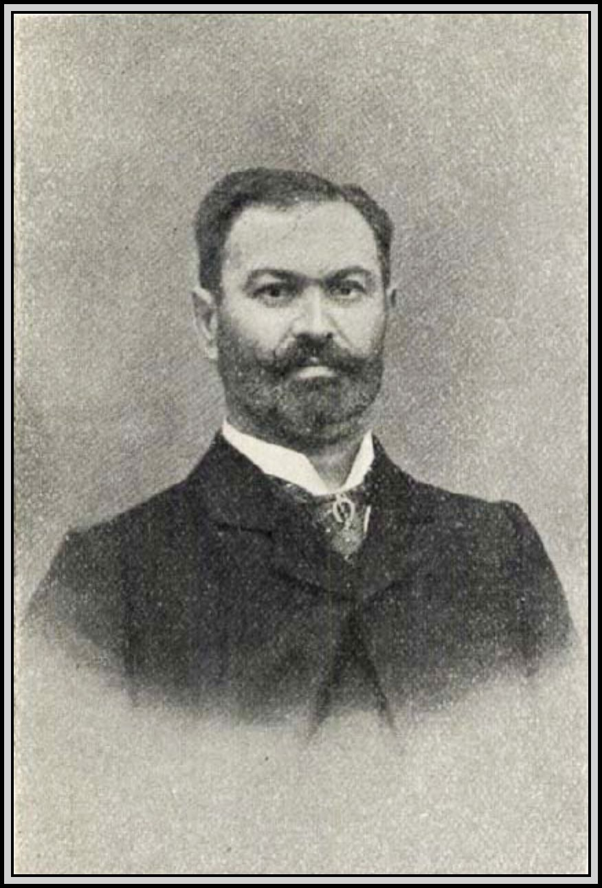 Ballagi Géza (Szarvas, 1851. május 3. – Sárospatak, 1907. június 17.) történész, jogtudós, a Magyar Tudományos Akadémia tagja, Ballagi Mór fia.